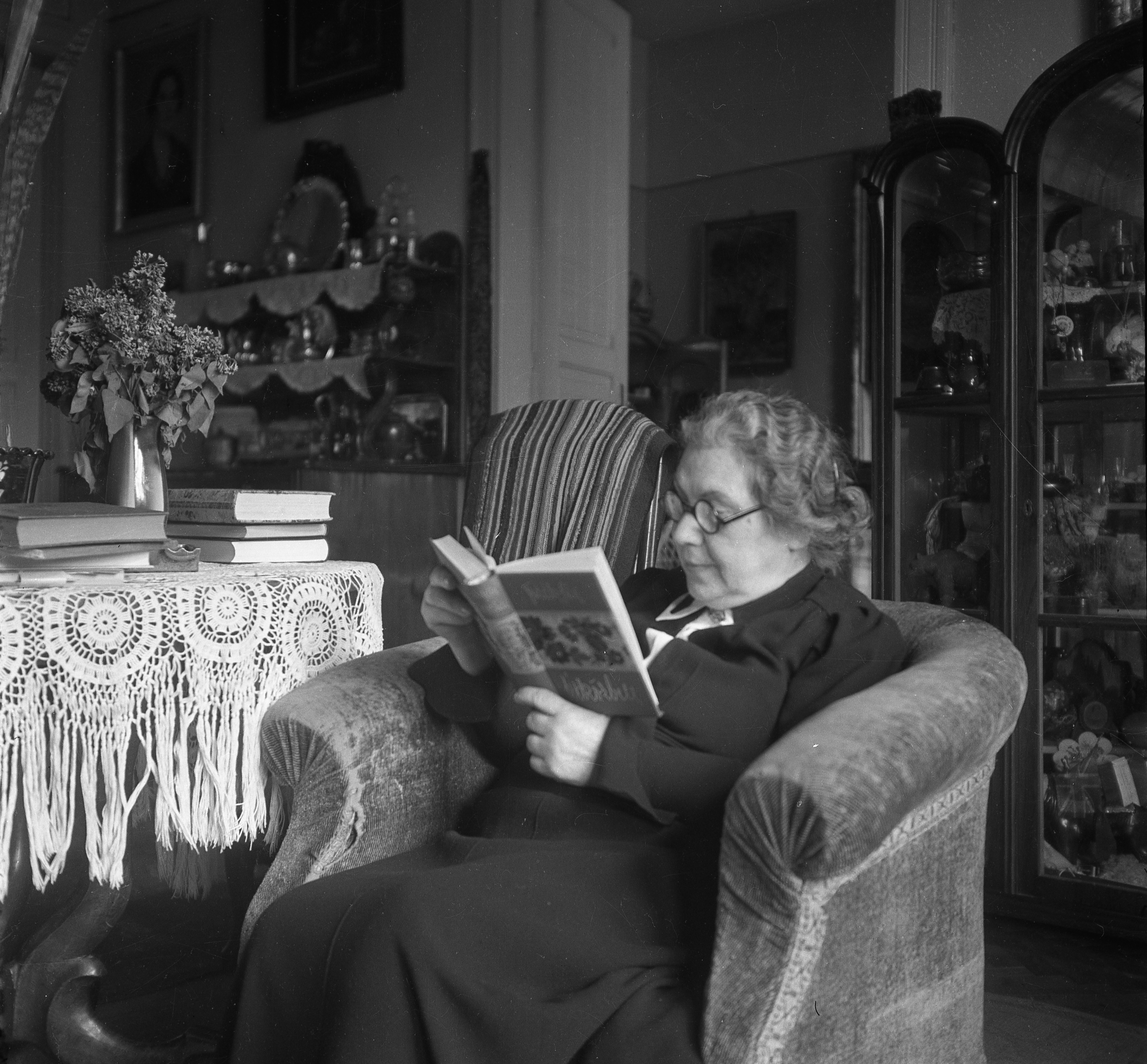 Hajnóczy József (Bors) utca 18., Gábos Kornélia. Location: Hungary, Budapest XII. Tags: interior, genre painting, reading, book, Budapest, opera singer, lilac, arm chair, celebrity Title: Hajnóczy József (Bors) utca 18., Gábos Kornélia.